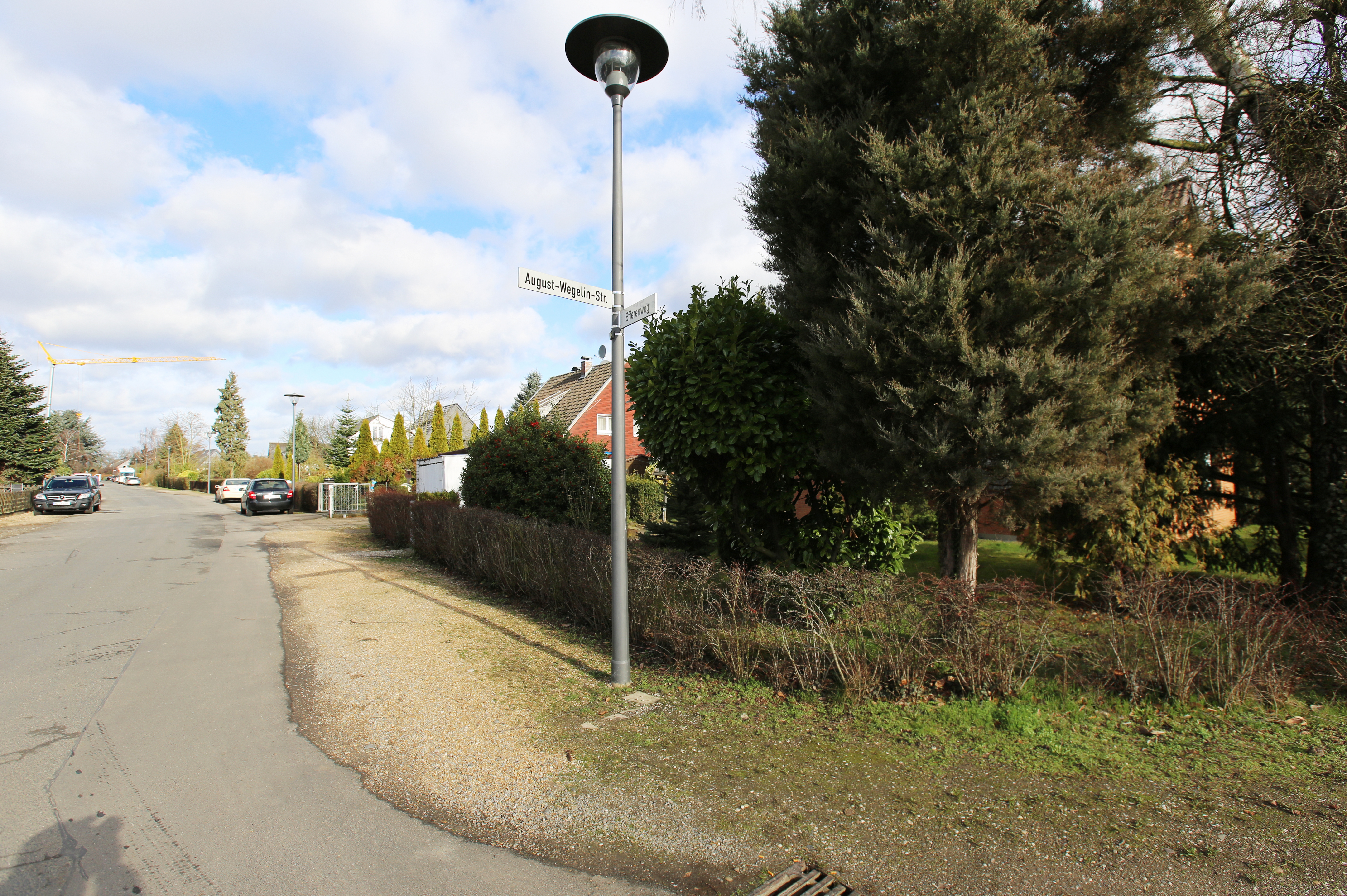 Straßenbenennung in Höningen (Rondorf), an der Kalscheurer Straße